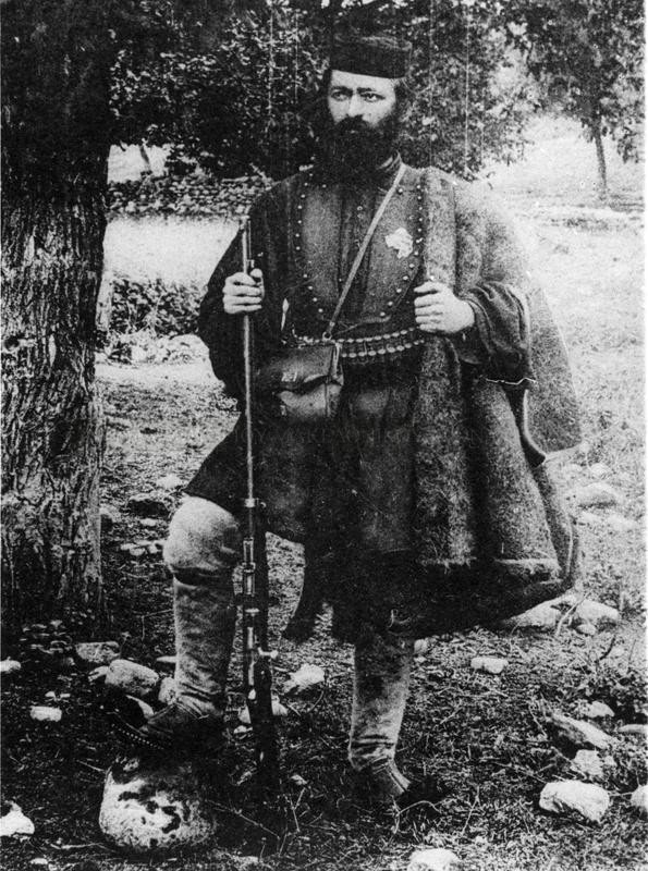 Андонис Зоис